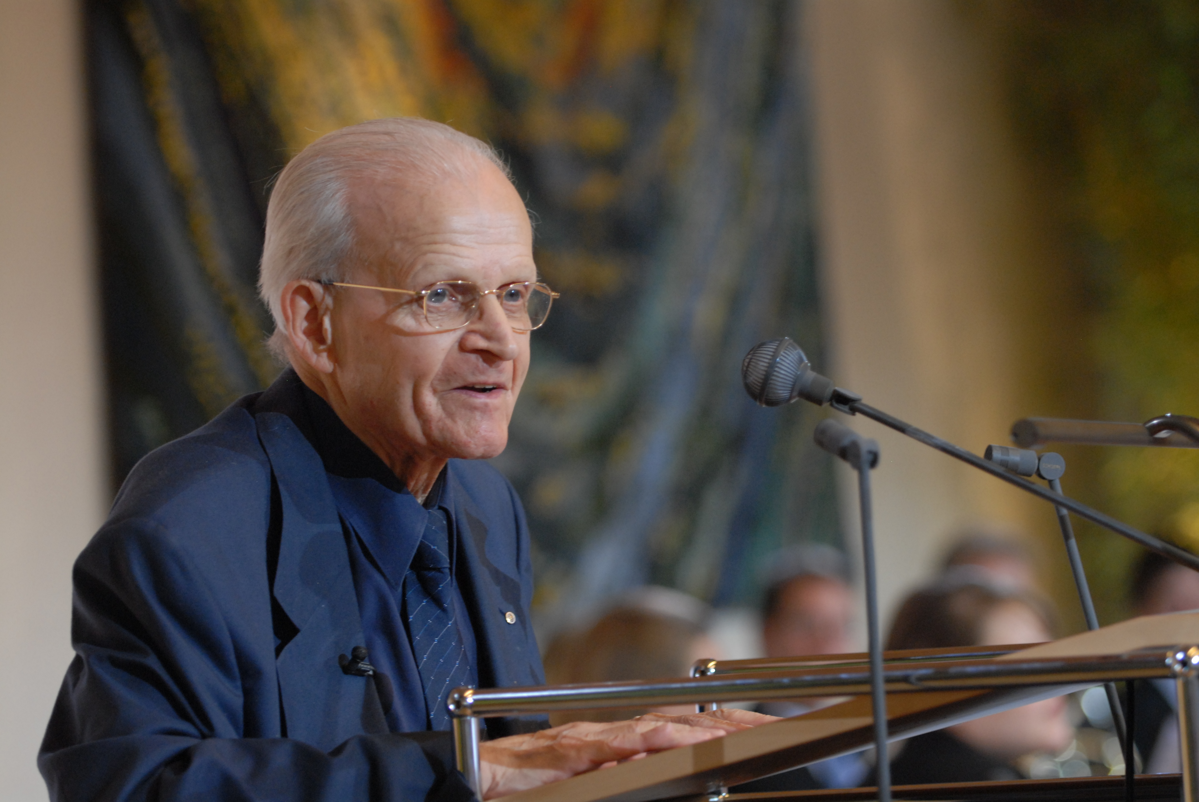 Vortrag Biser_90. Geburtstag